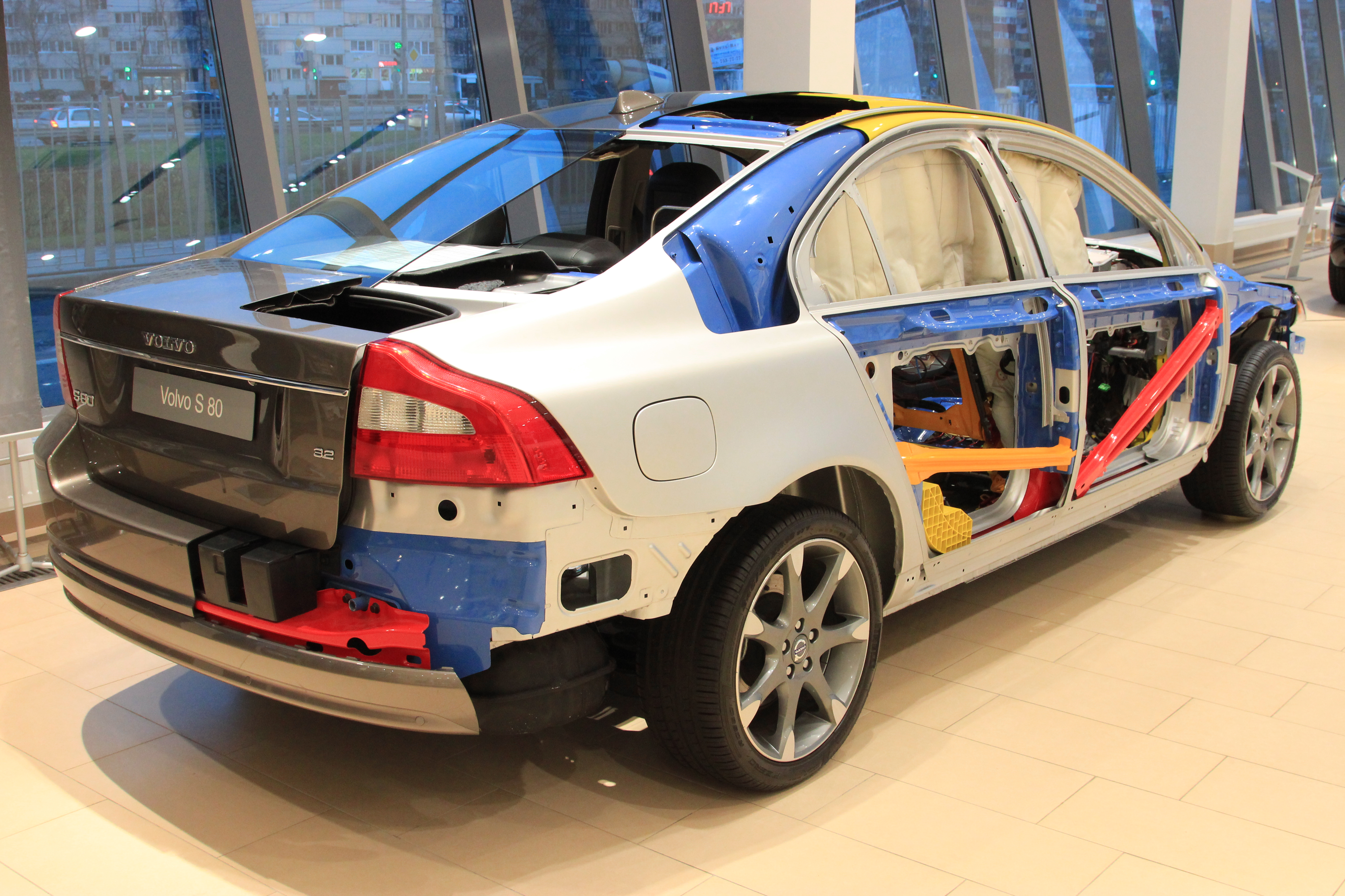 Volvo S80 в разрезе_вид сзади_Свид-Мобиль